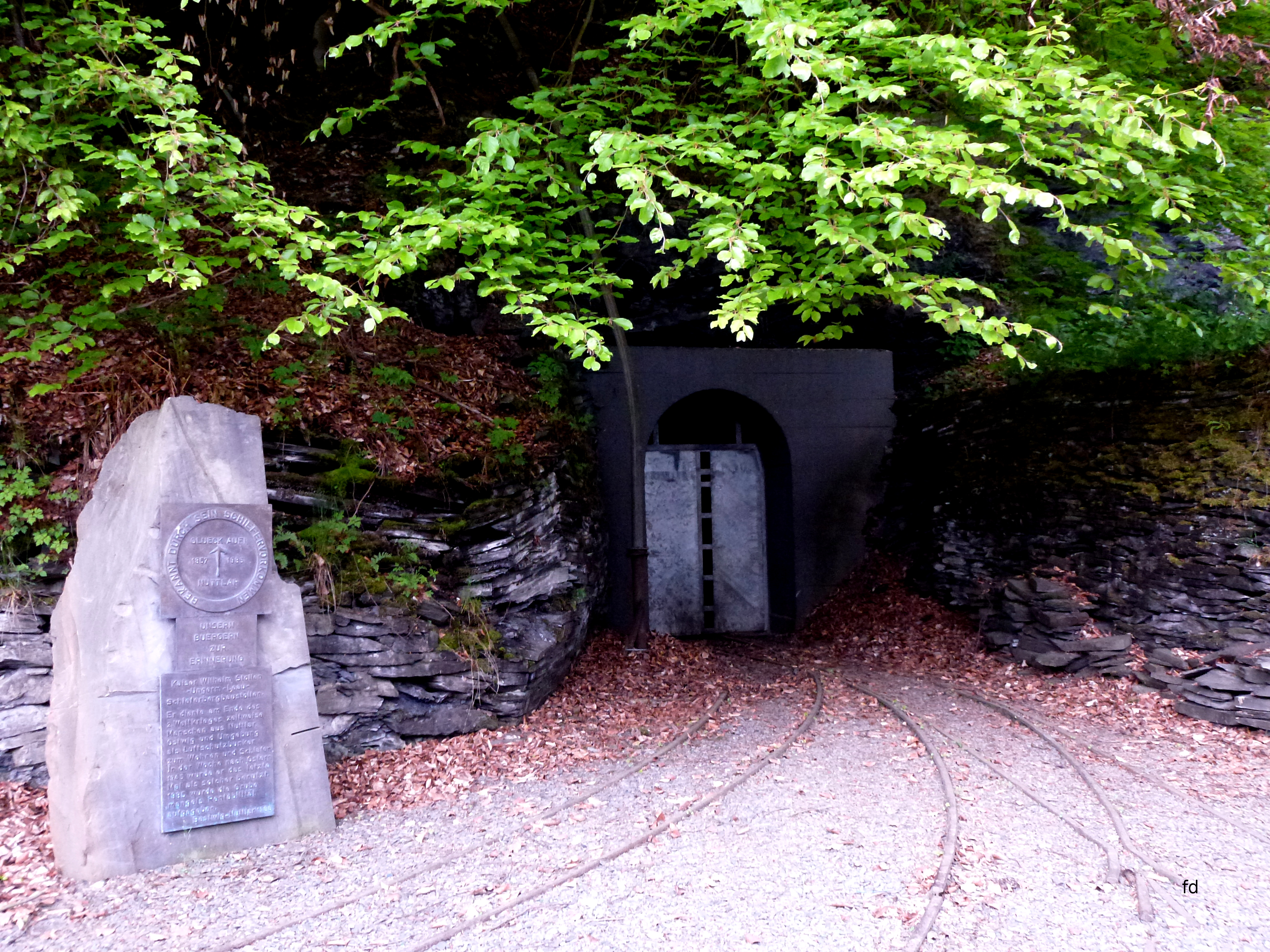 Stolleneingang